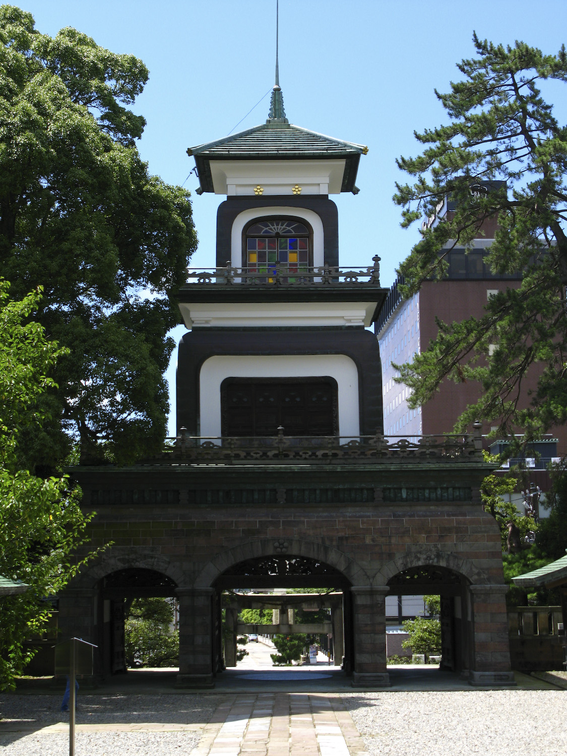 Oyama Shrine, Kanazawa, Ishikawa Prefecture, Japan